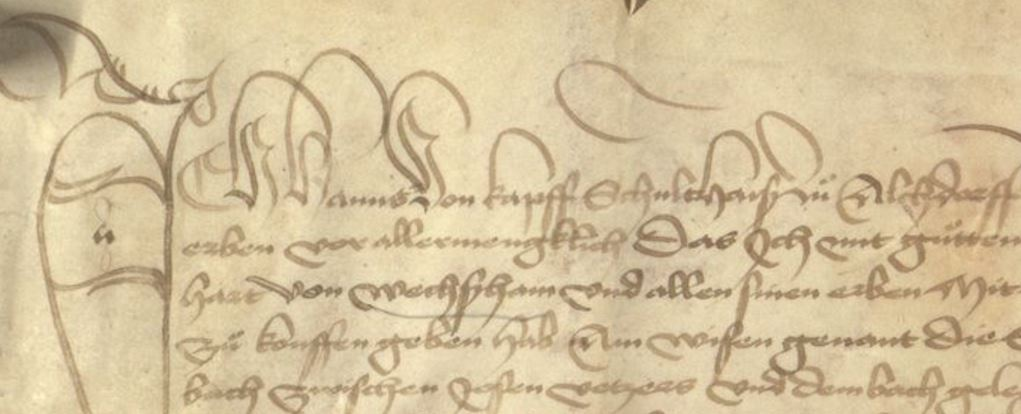 Urkunde des "Hanns von Kapff", Schultheiß zu Alfdorf (Ausschnitt). Staatsarchiv Ludwigsburg B 177 S U 980